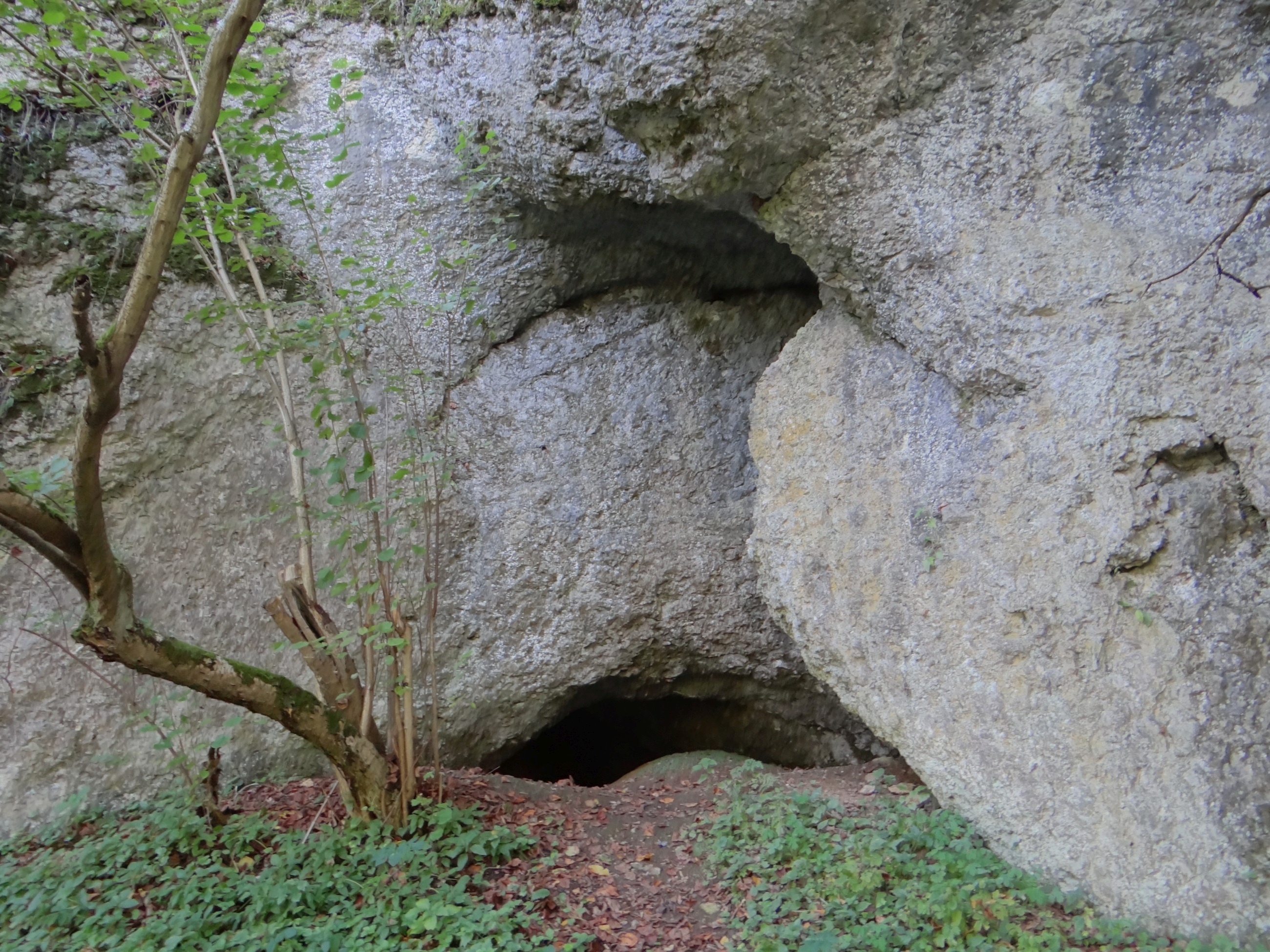 Jaskinia Gaudynowska